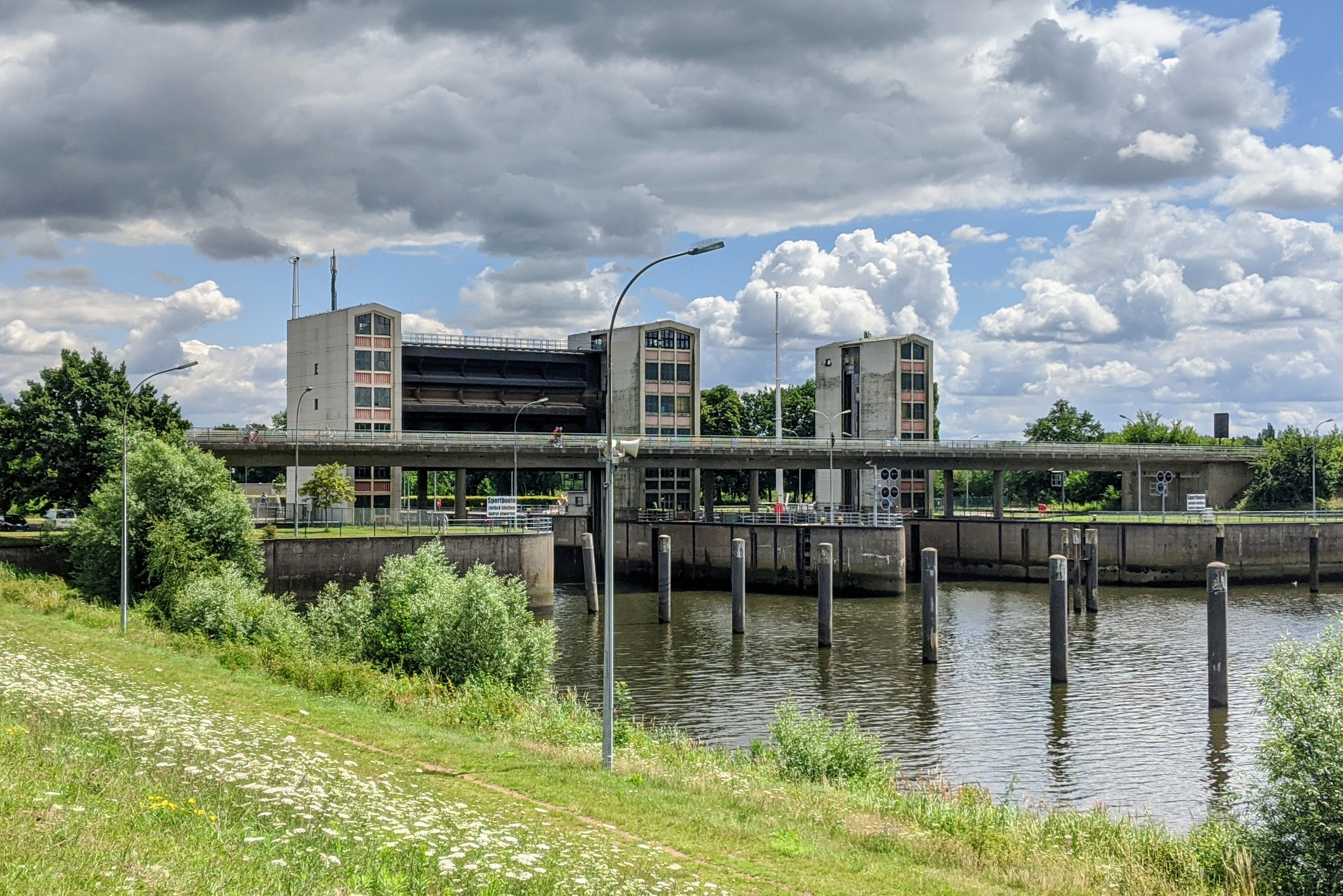 Schleuse an der Staustufe Geesthacht bei Hamburg